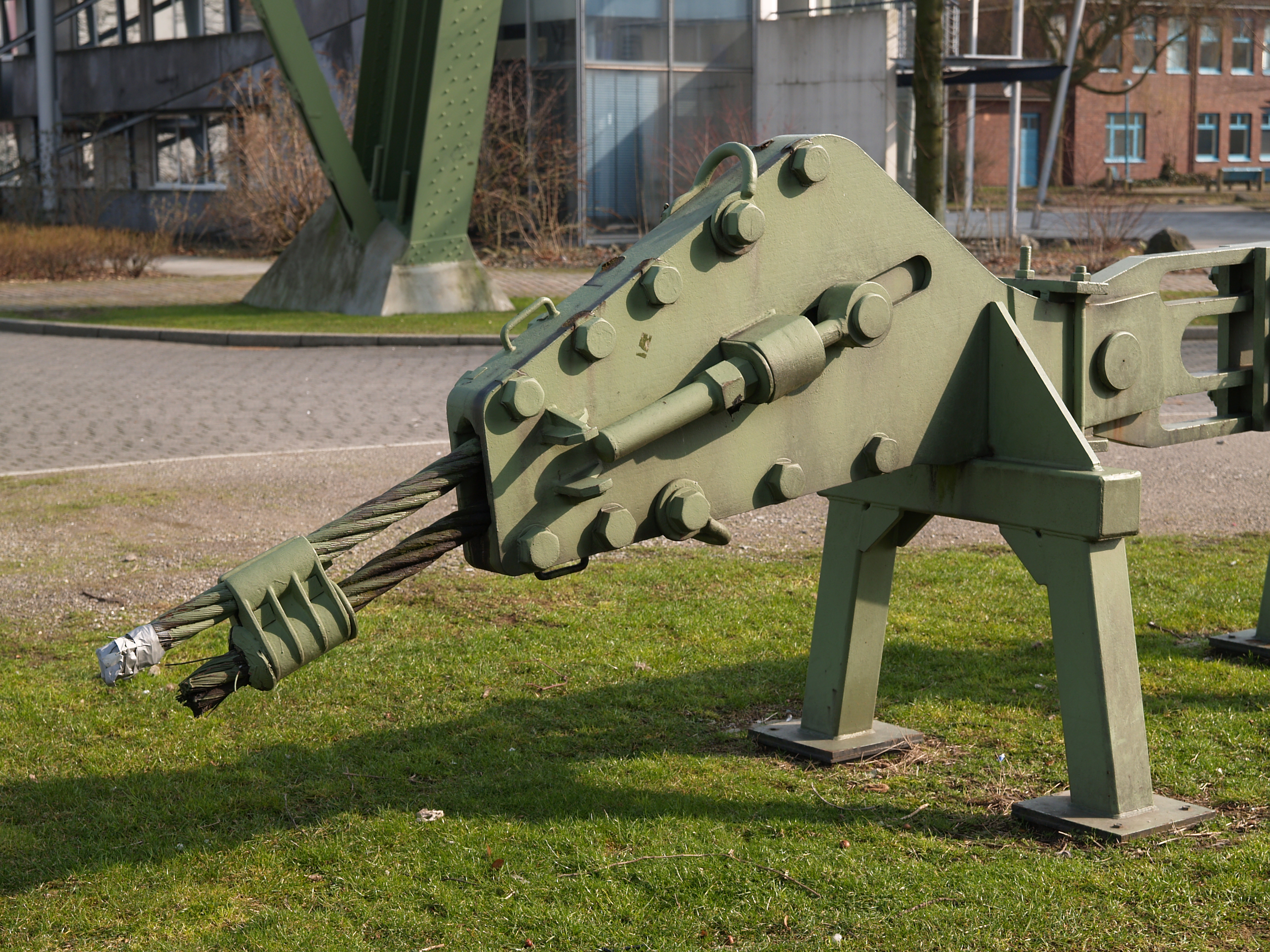 Aufgebocktes Zwischengeschirr, das Element zur Verbindung eines Förderkorbes mit dem Förderseil, Detail Einklemmvorrichtung für das Förderseil, vor dem Förderschacht der ehemaligen Zeche Erin in Castrop Rauxel. Im Betrieb ist die linke Seite oben.